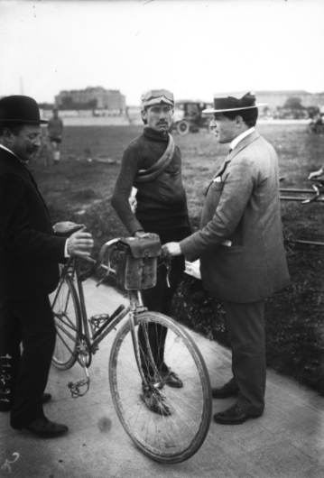 4 septembre 1910, Pélissier, 2e de la 14e et dernière étape du Tour de France des indépendants, étape Rouen-Paris avec arrivée des cyclistes au Parc des Princes.